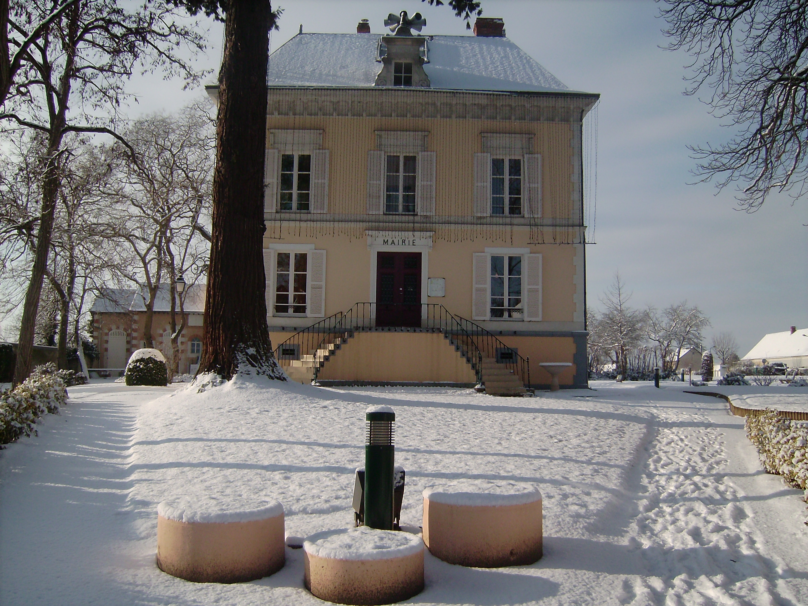 Photo de la Mairie de Mezeray, France (sarthe)après de fortes chûtes de neige.